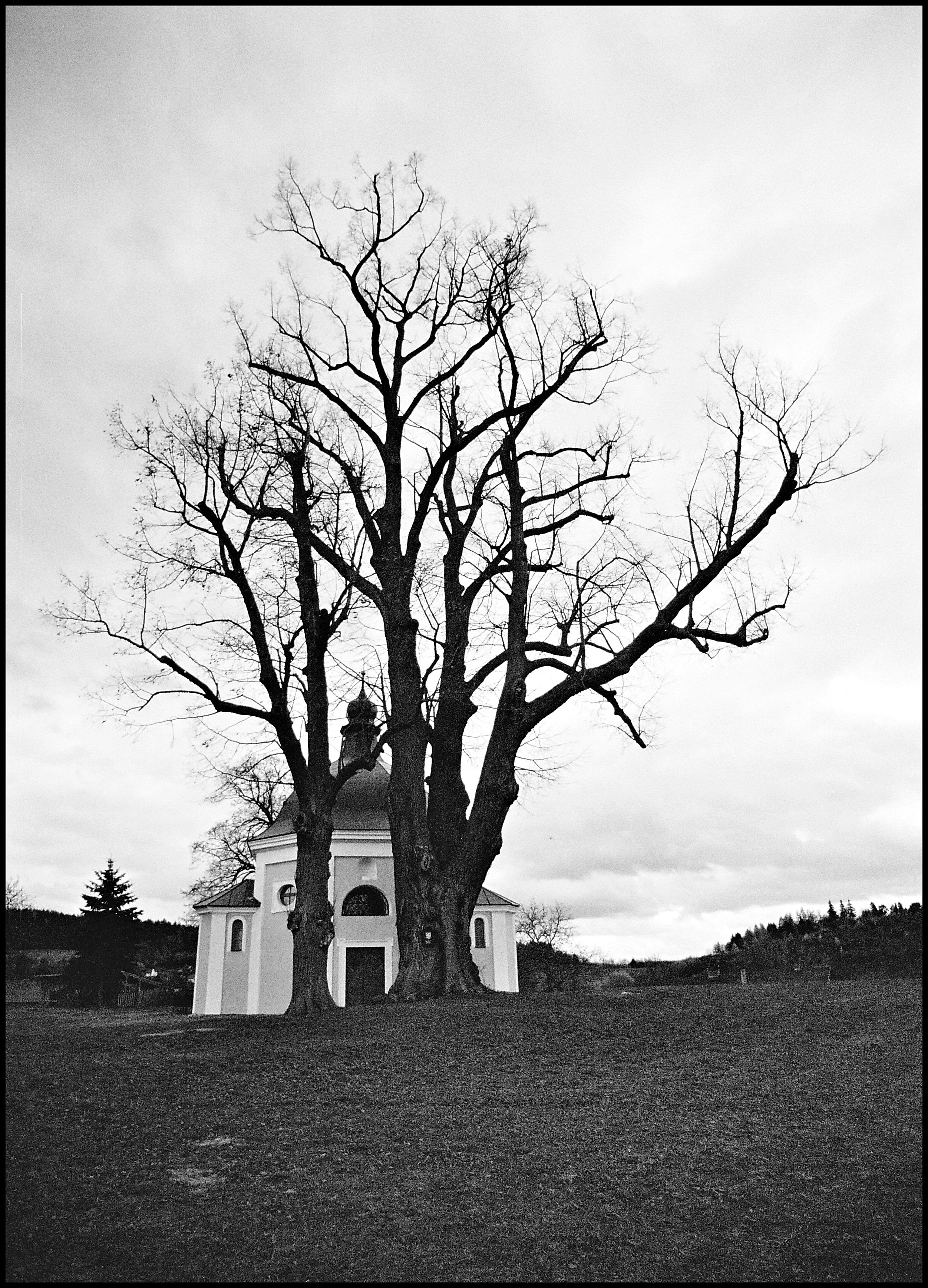 Lípa u barokní kapličky na návrší na konci obce Obytce u Klatov.